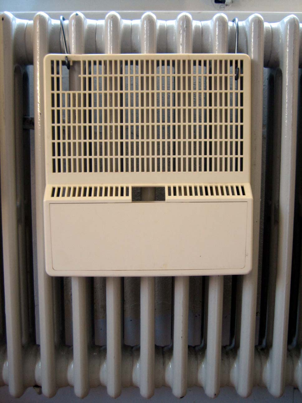 Luftbefeuchter, Humidifier for Radiator